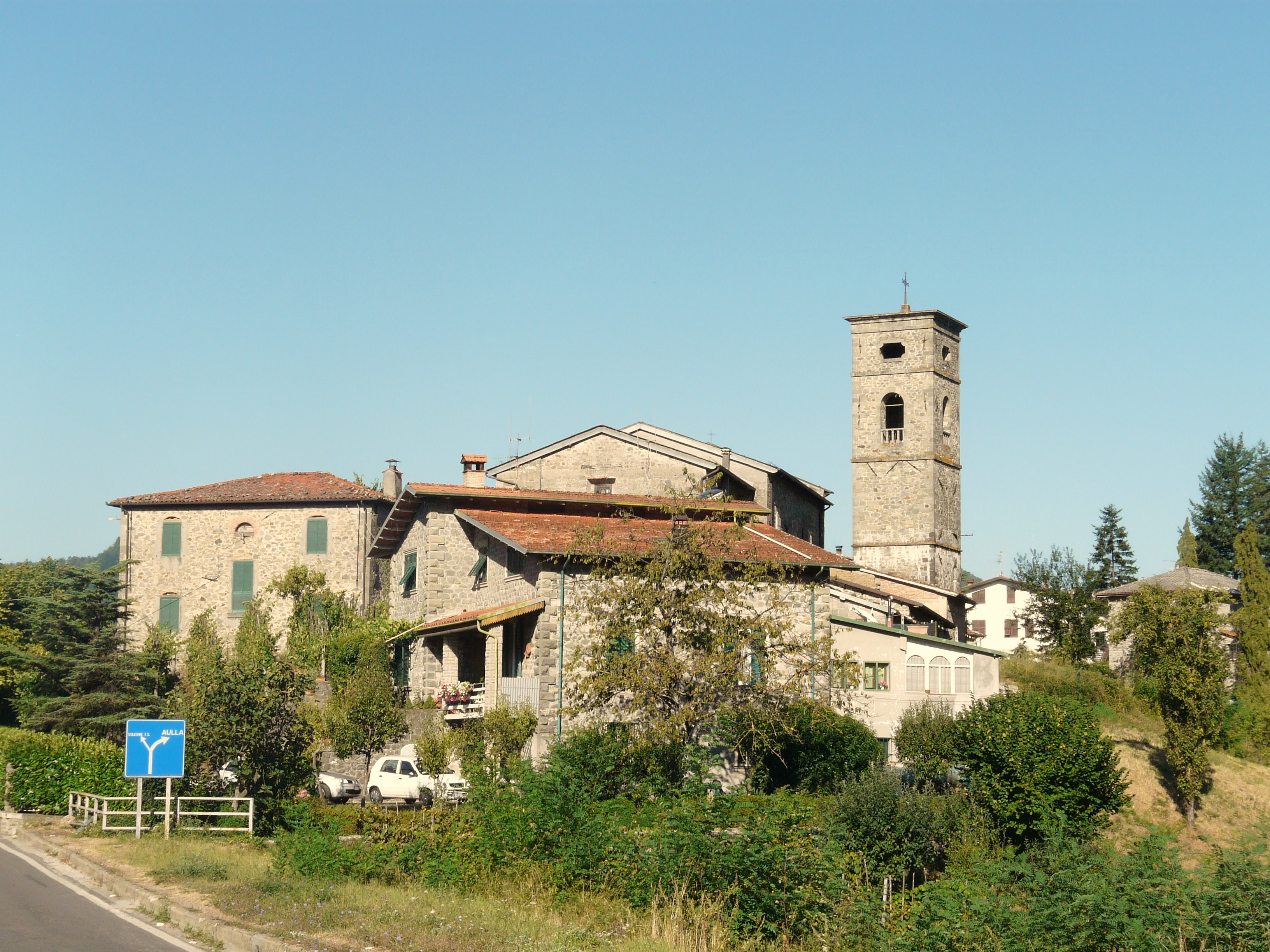 Piazza al Serchio, Toscana, Italia